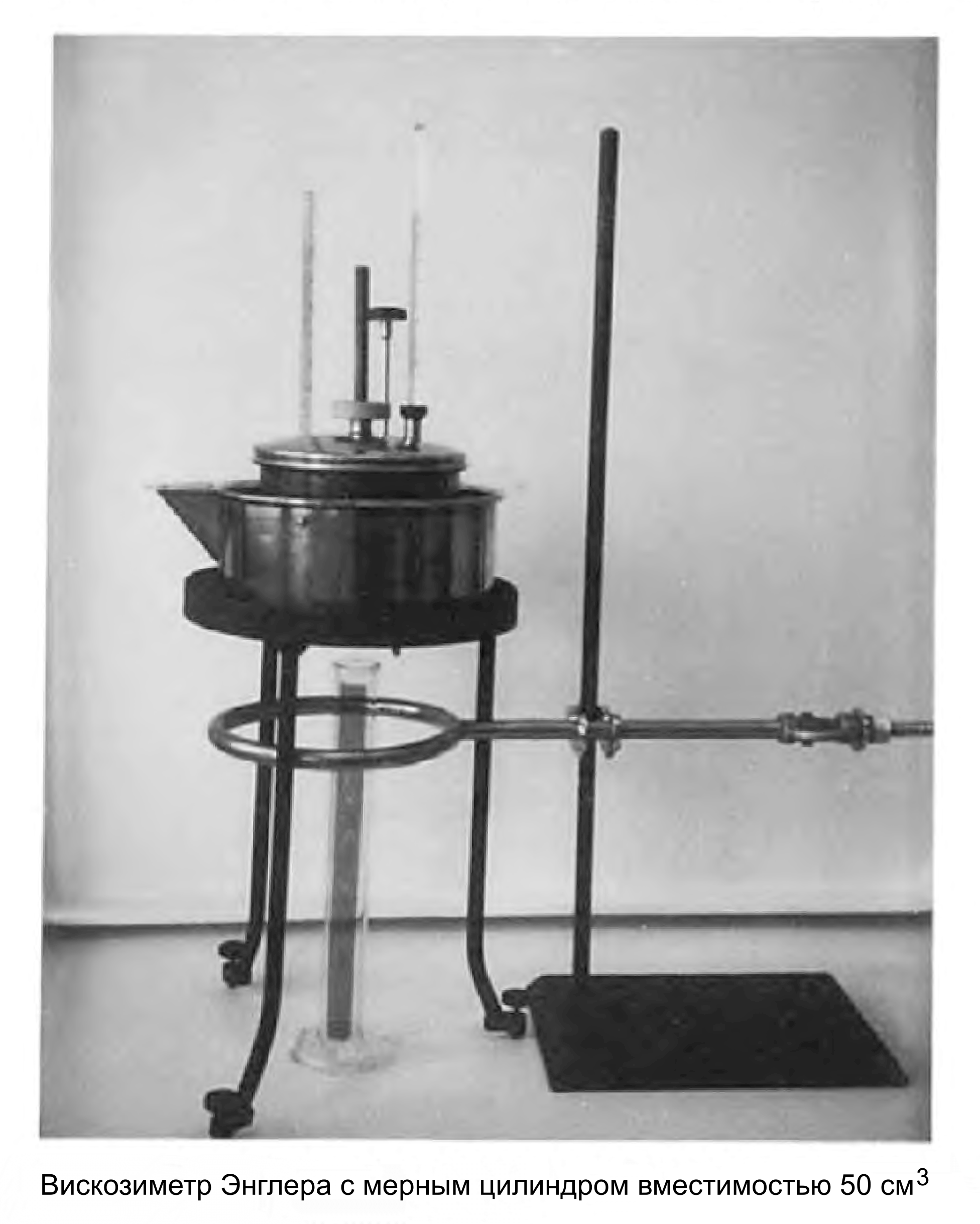 Вискозиметр Энглера для определения условной вязкости жидкости с мерным цилиндром вместимостью 50 куб. см